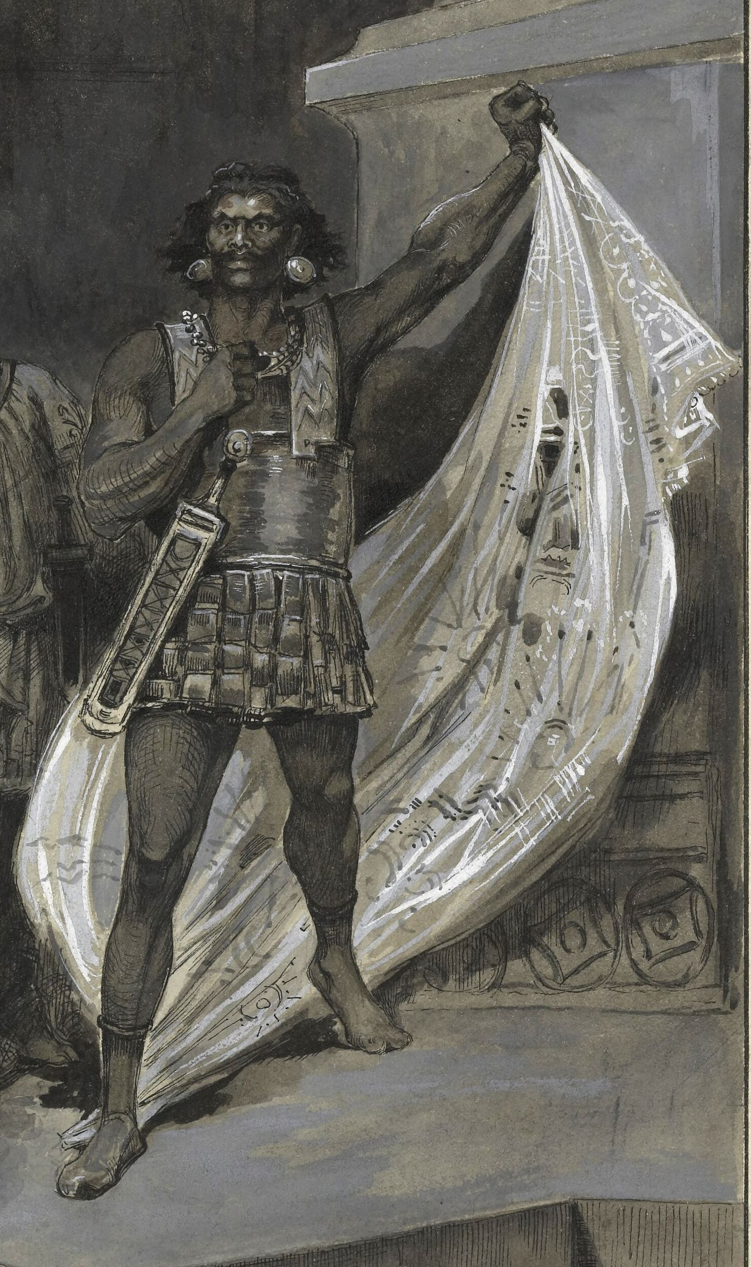 Mato rappresentato da V.A. Poirson